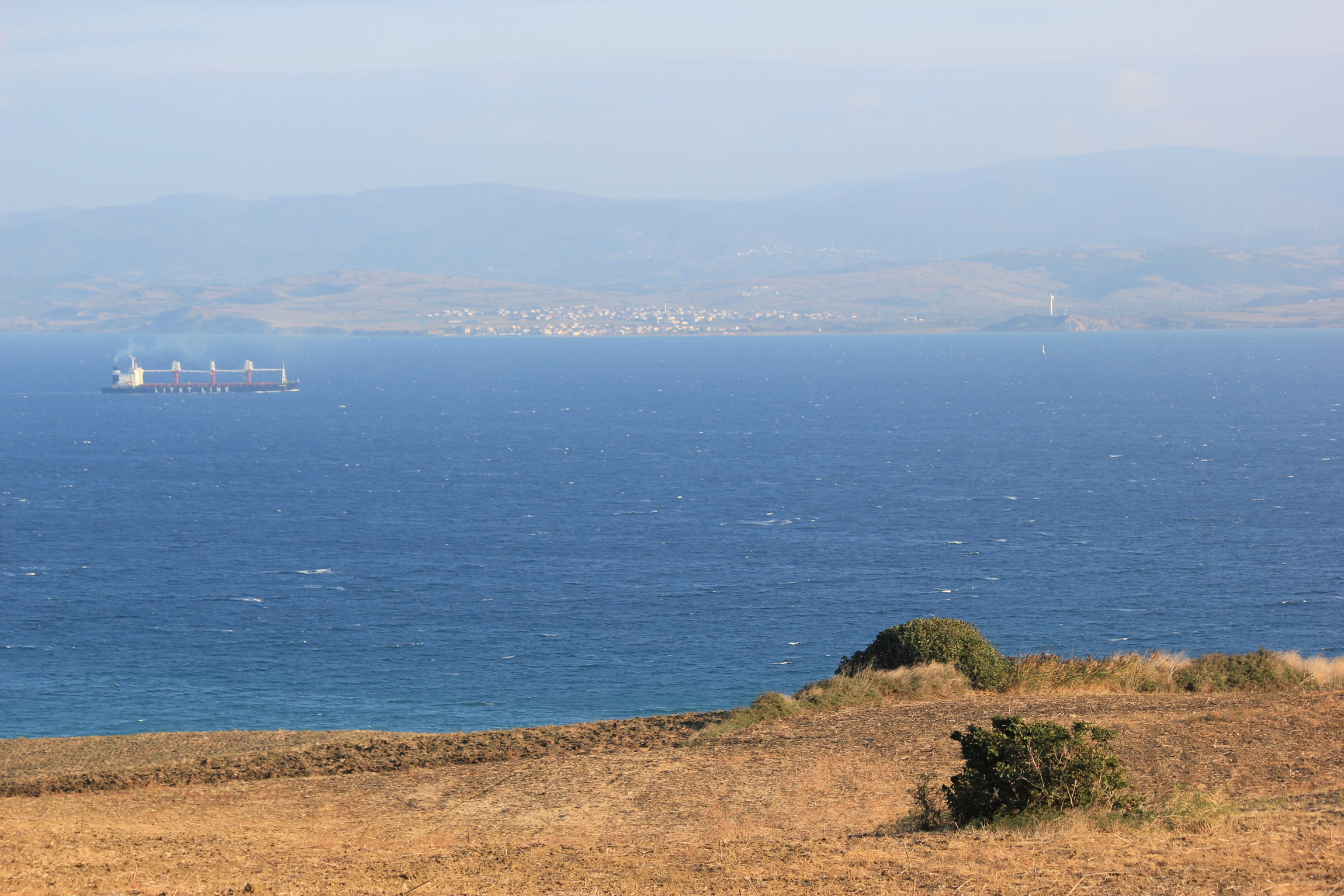 Blick über die Dardanellen bei Gallipoli (von Europa nach Asien).